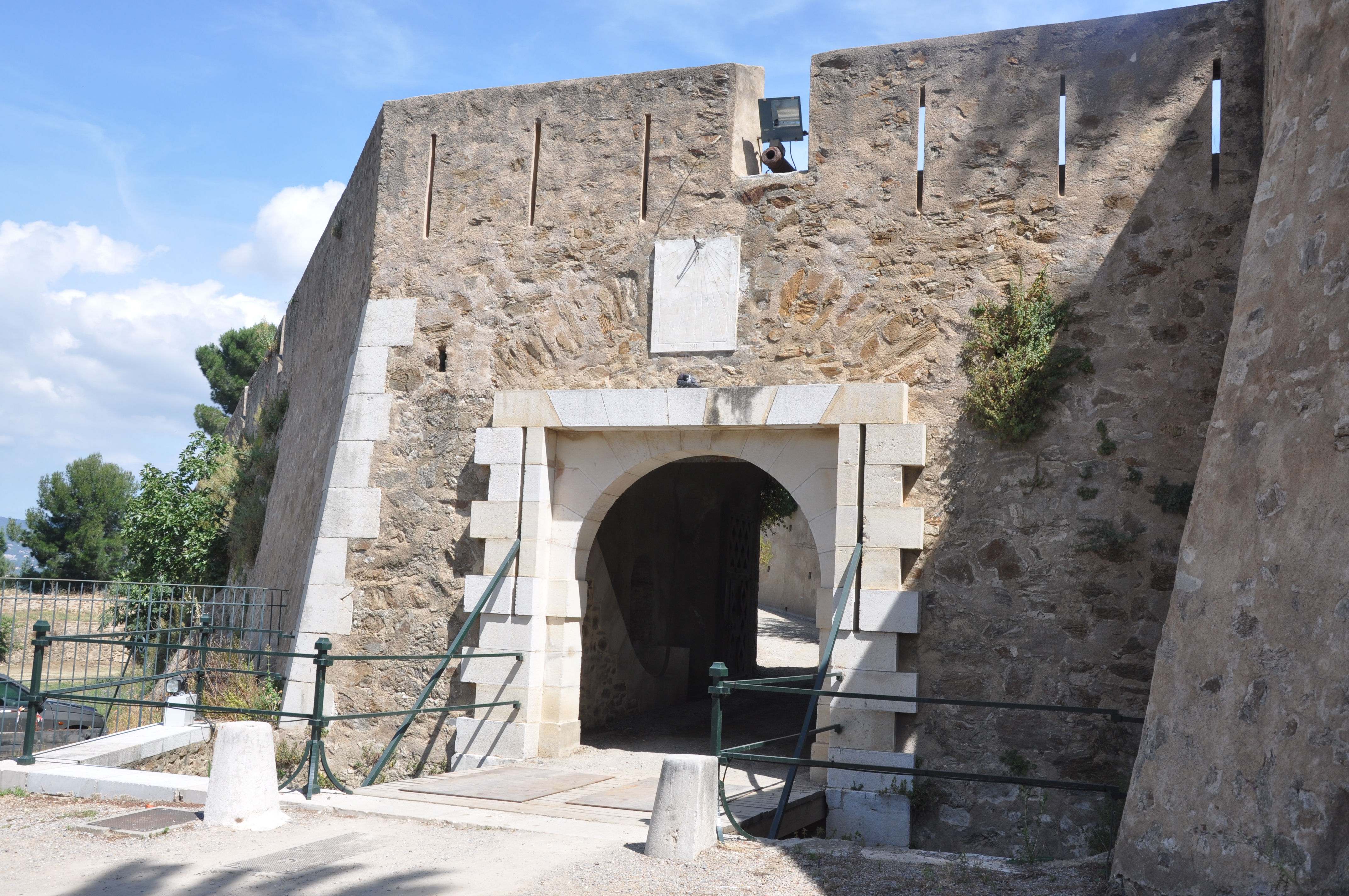 Pont-levis de la Citadelle